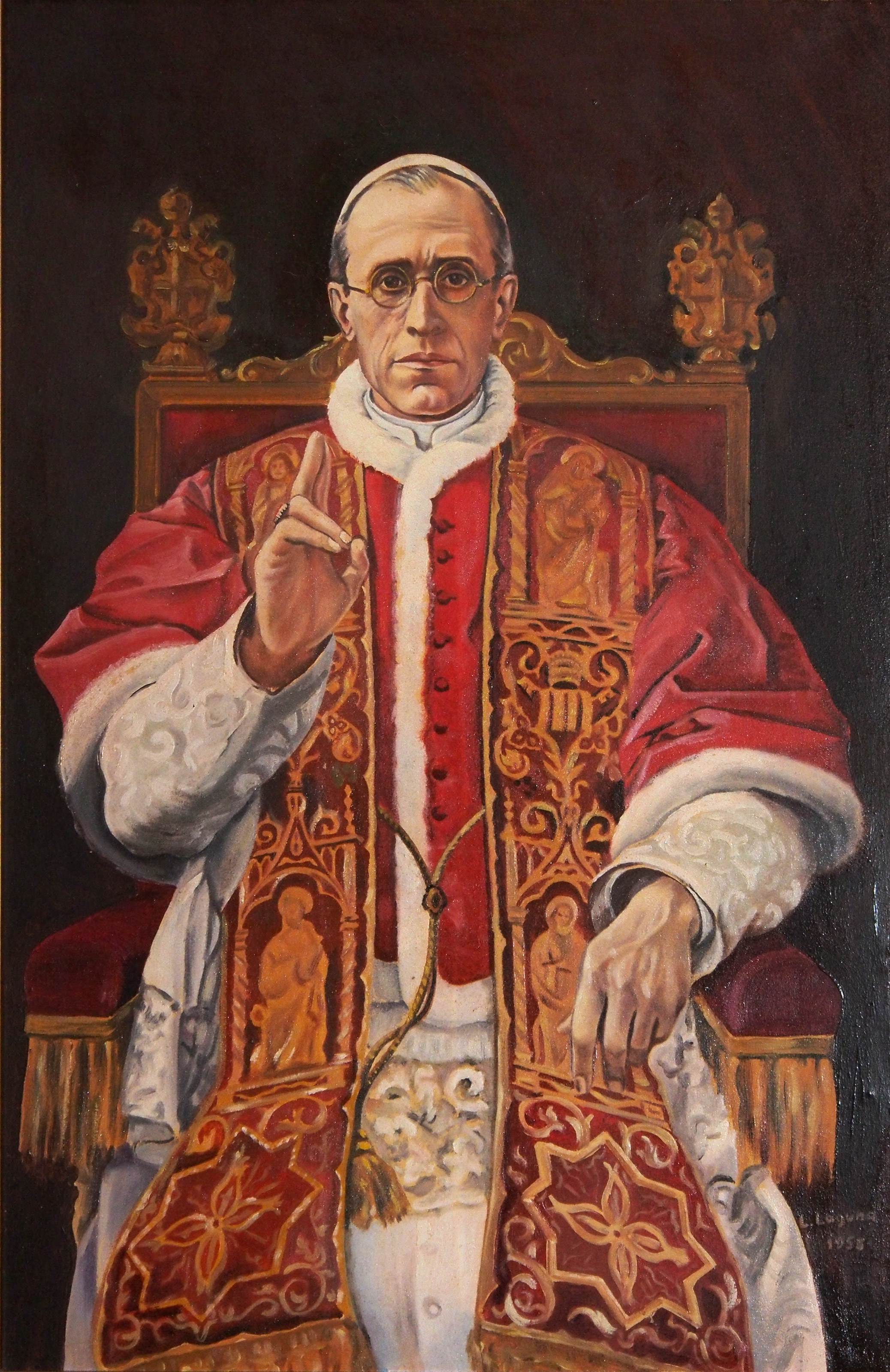 Retrato de Pío XII, papa, basado en fotografías. Luis Fernández-Laguna, 1921-1990. Óleo sobre lienzo.